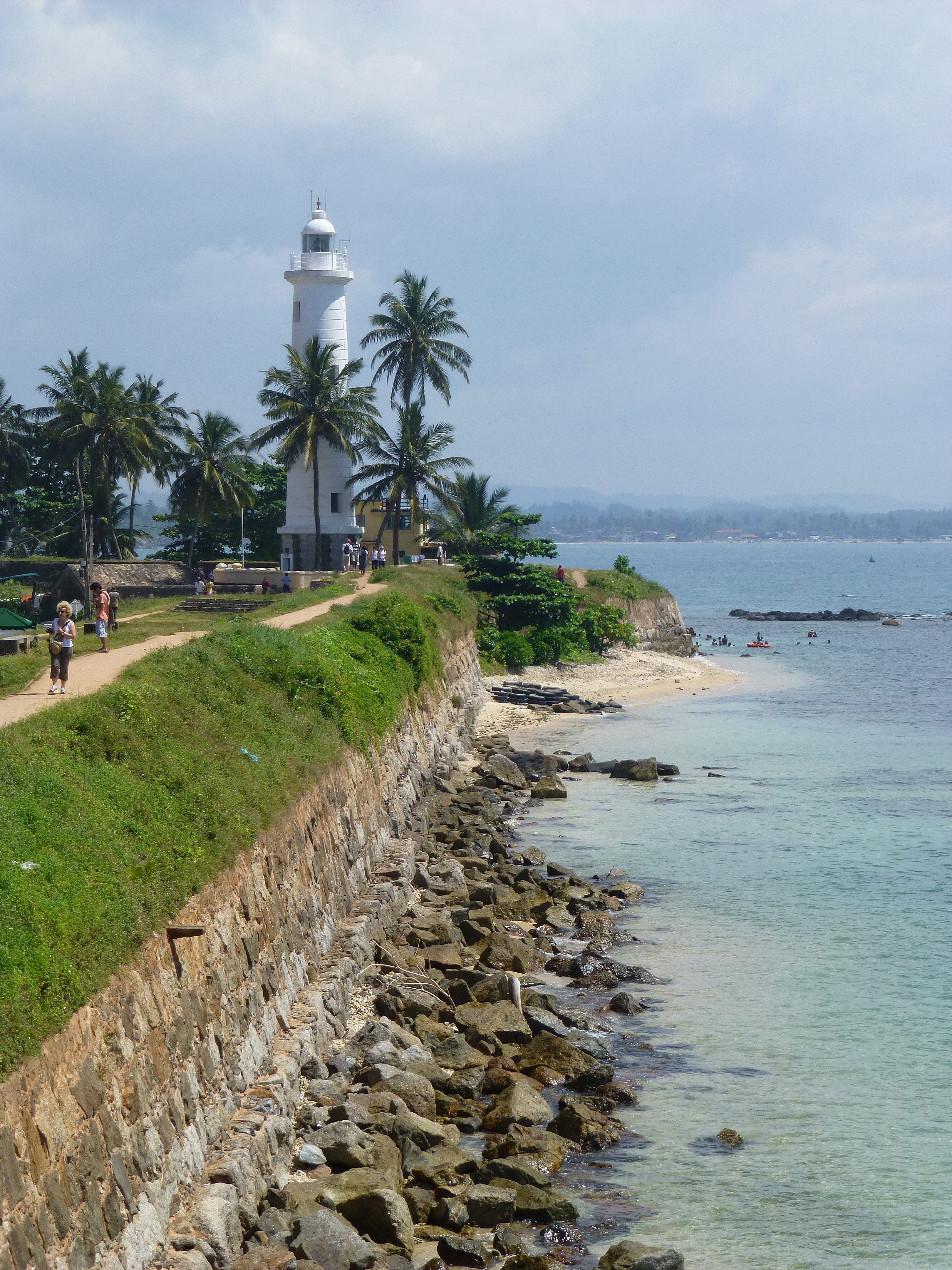 Phare de Galle (Sri Lanka)